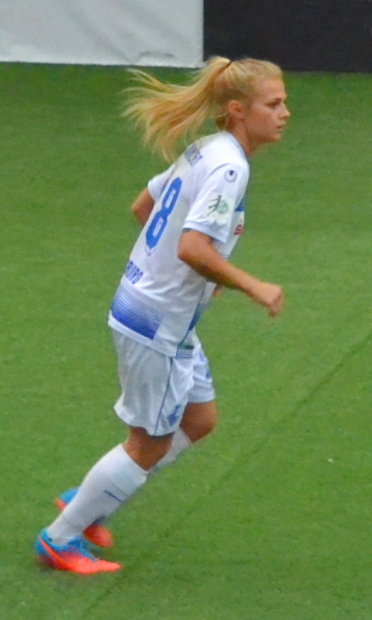 Nicole Munzert (MSV Duisburg) beim SAP Frauen-FußballCup 2017